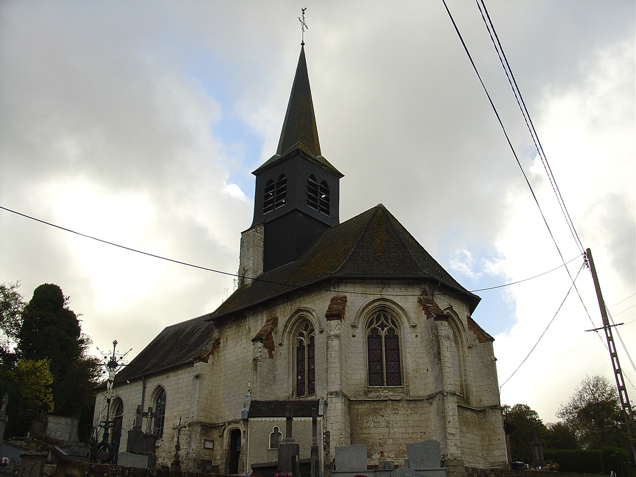 Église de Saint-Denoeux .